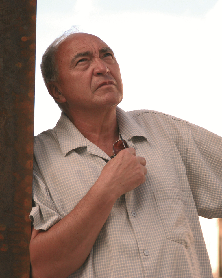 KIEFF Antonio Grediaga